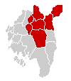 Rakkestad fogderis geistlige inndeling i 1701